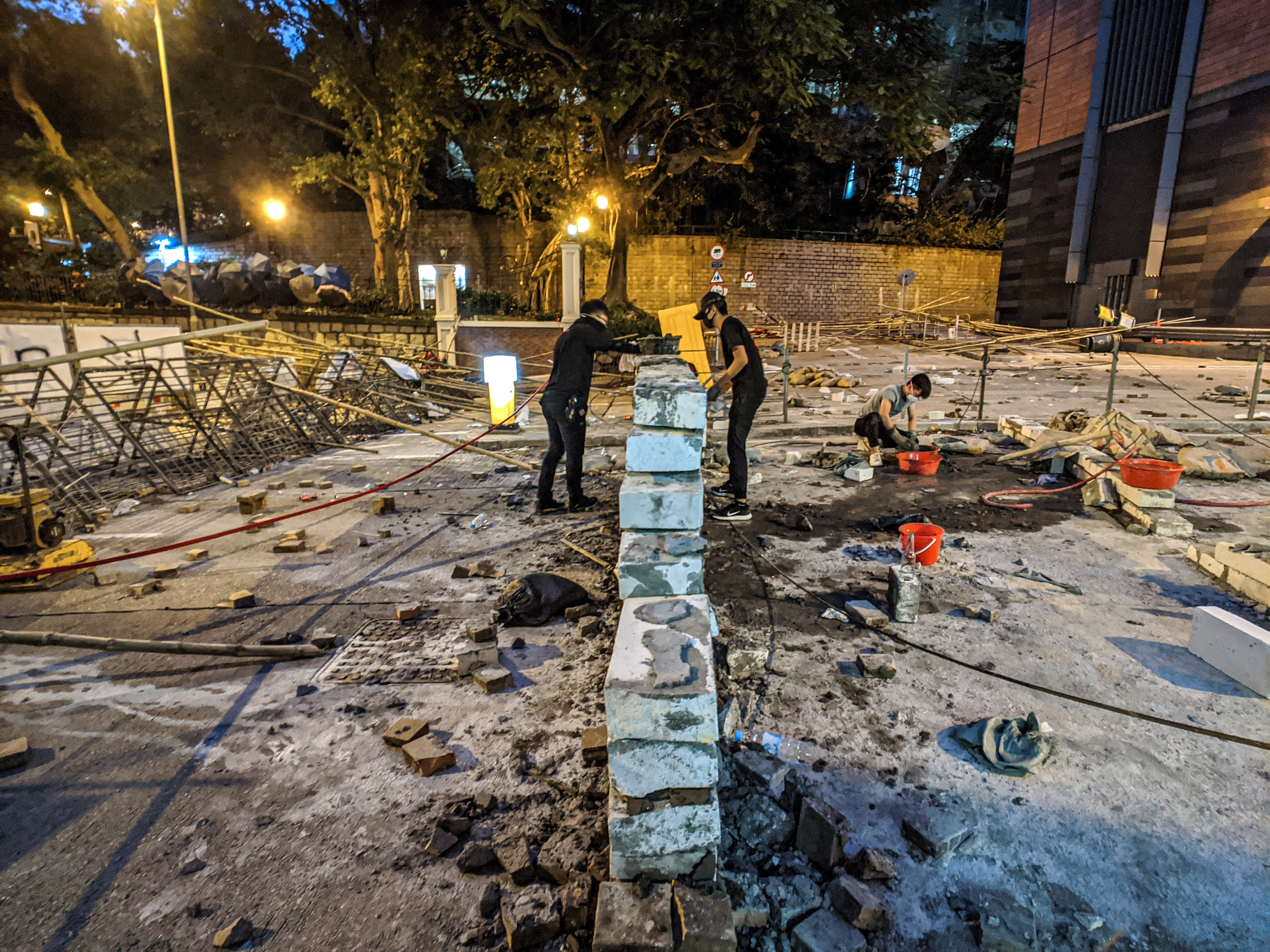 IMG_20191115_175826